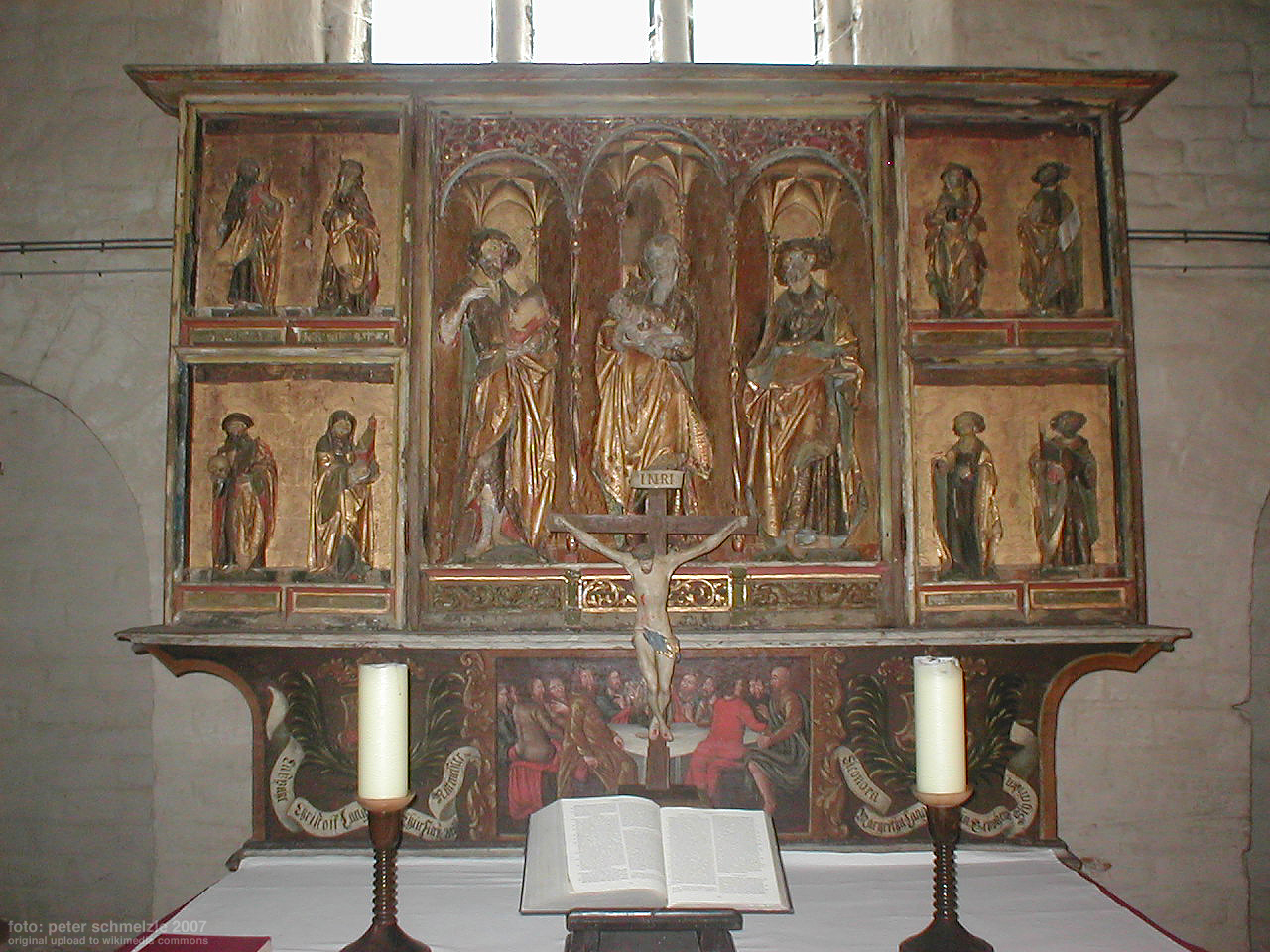 Altar der Dorfkirche Nätebow in Bollewick, Lkr. Müritz